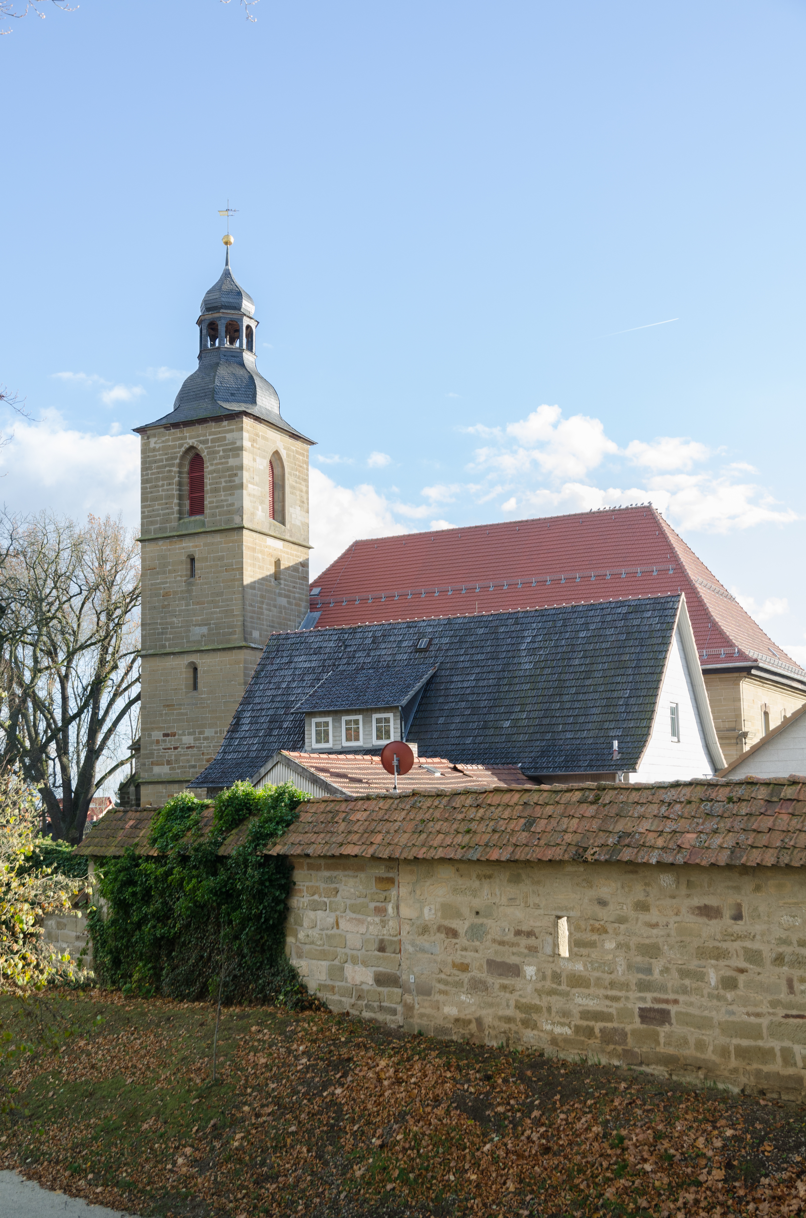 Bad Rodach, Stadtmauer, St. Johannis